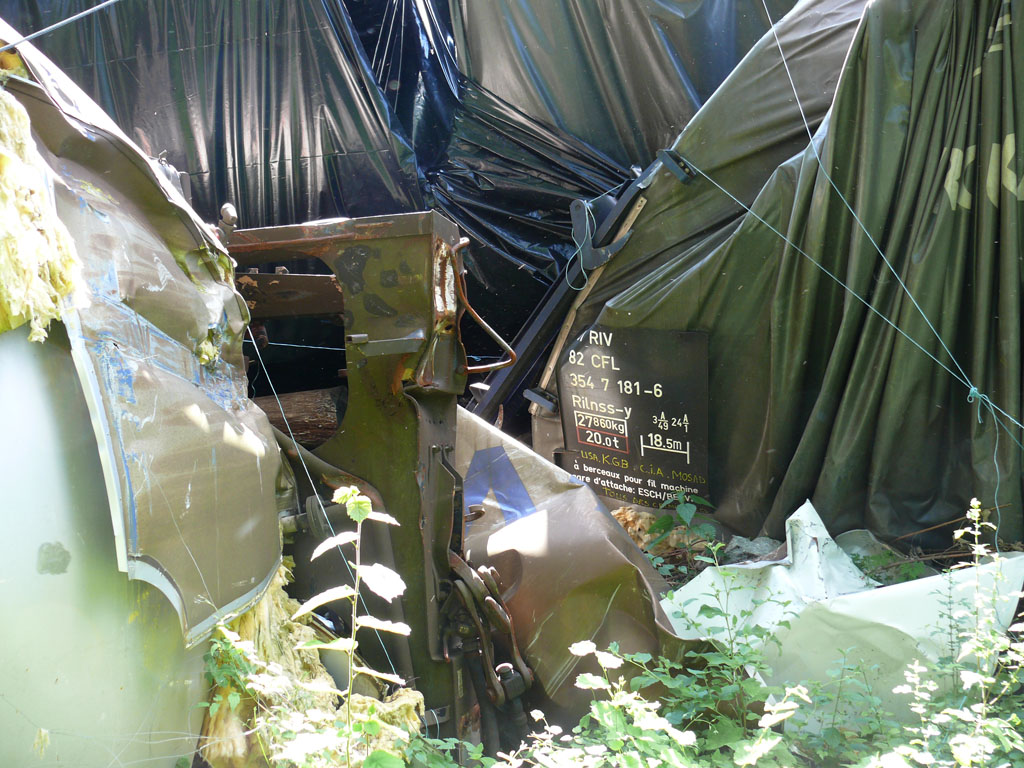 Wagons accidentés à Zoufftgen